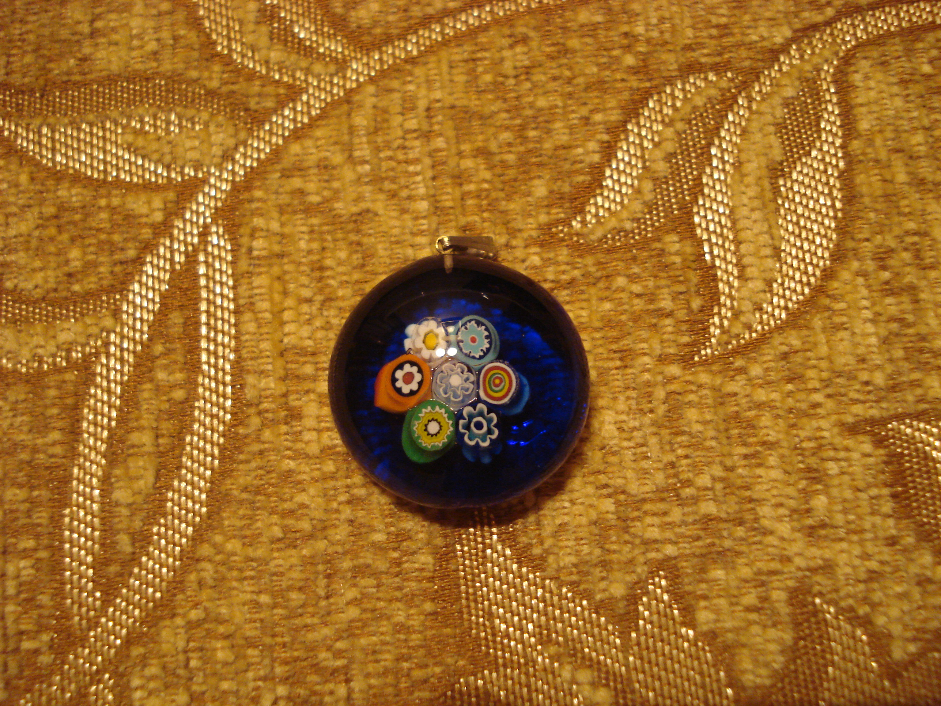 Glass-made pendant from Murano